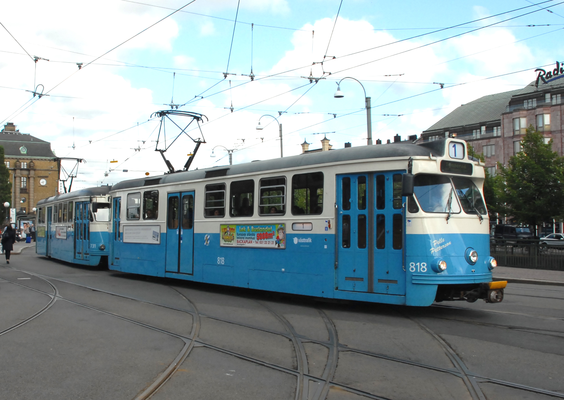 Göteborgs Spårvägar AB tram 818 (M29) en 731 (M28) te Göteborg.